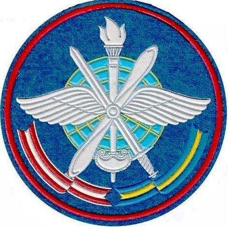 Эмблема ВВА имени Ю.А. Гагарина, утвержденная ГК ВВС. 2005 г.